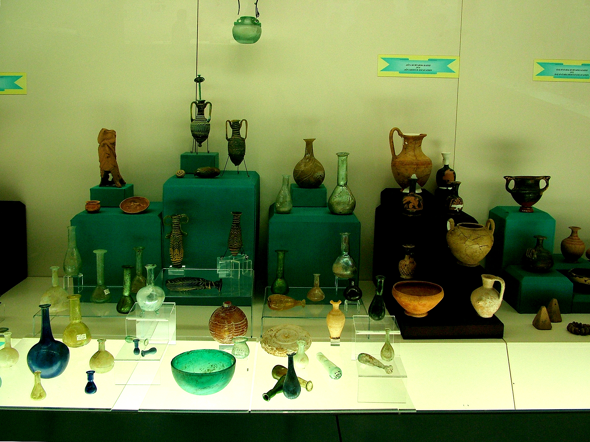 Régészeti Múzeum: Antalya, Törökország